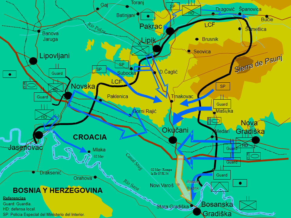 Desarrollo de la operación Bljesak Elaborado sobre la base de: Brigović, Ivan; Martinić Jerčić, Natko; Radoš, Ivan (2015). «Vojno Redarstvena Operacija Bljesak». Hrvatski memorijalno-dokumentacijski centar Domovinskog rata (en inglés) (Zagreb). Consultado el 01 de septiembre de 2018. Republic of Serbian Krajina. Main Staff of the Serbian Army (13-07-1995). Report of the Commission Charged with Establishing Responsibility of the Organization for the Fall of Western Slavonia (en inglés). Documento ICTY 0281-1094-0281-1105-EDt.doc/zv. Knin. State Fact Findings Commision on the causes and the manner of the causes of the fall of Western Slavonia (11 de julio de 1995). Report on the causes of the fall of Western Slavonia (en ingles). Documento ICTY 0326-6252-0326-6273/uj. Knin